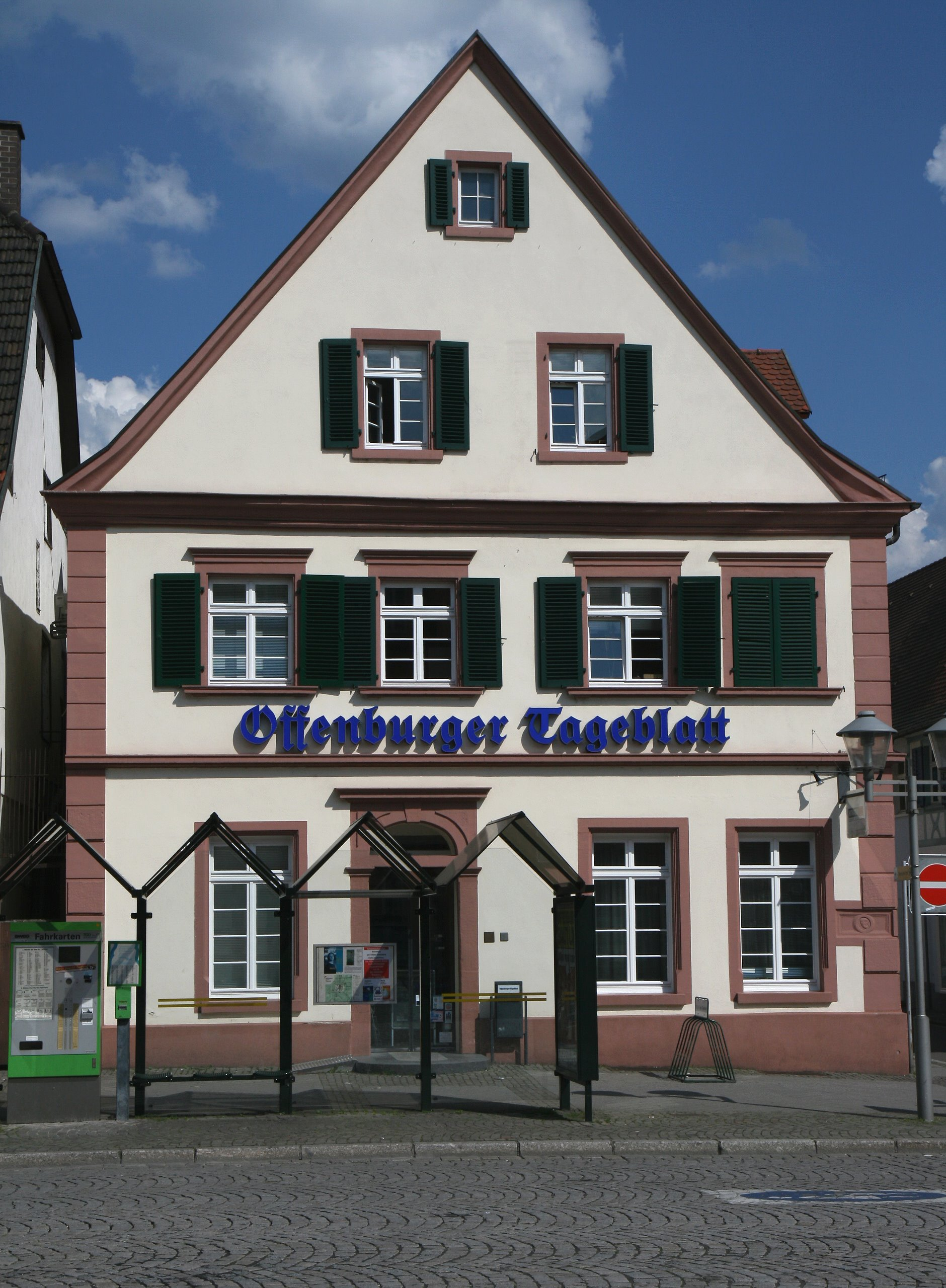 Lokalredaktion Offenburger Tageblatt in Offenburg, Hauptstraße.